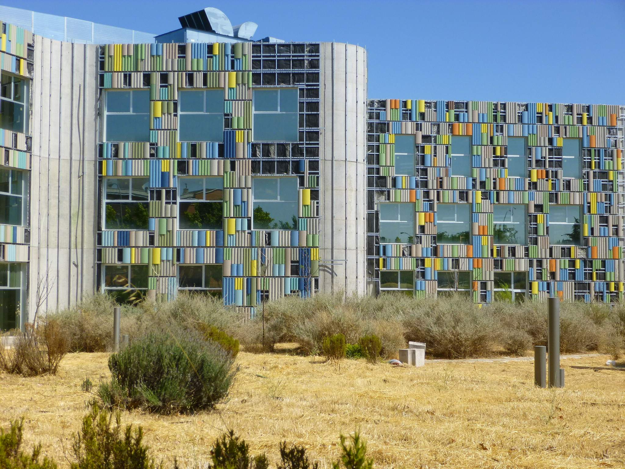 Biblioteca Central y Archivo Municipal Central de Leganés, una de las varias obras públicas que la crisis y la corrupción dejaron sin terminar y semi-abandonadas